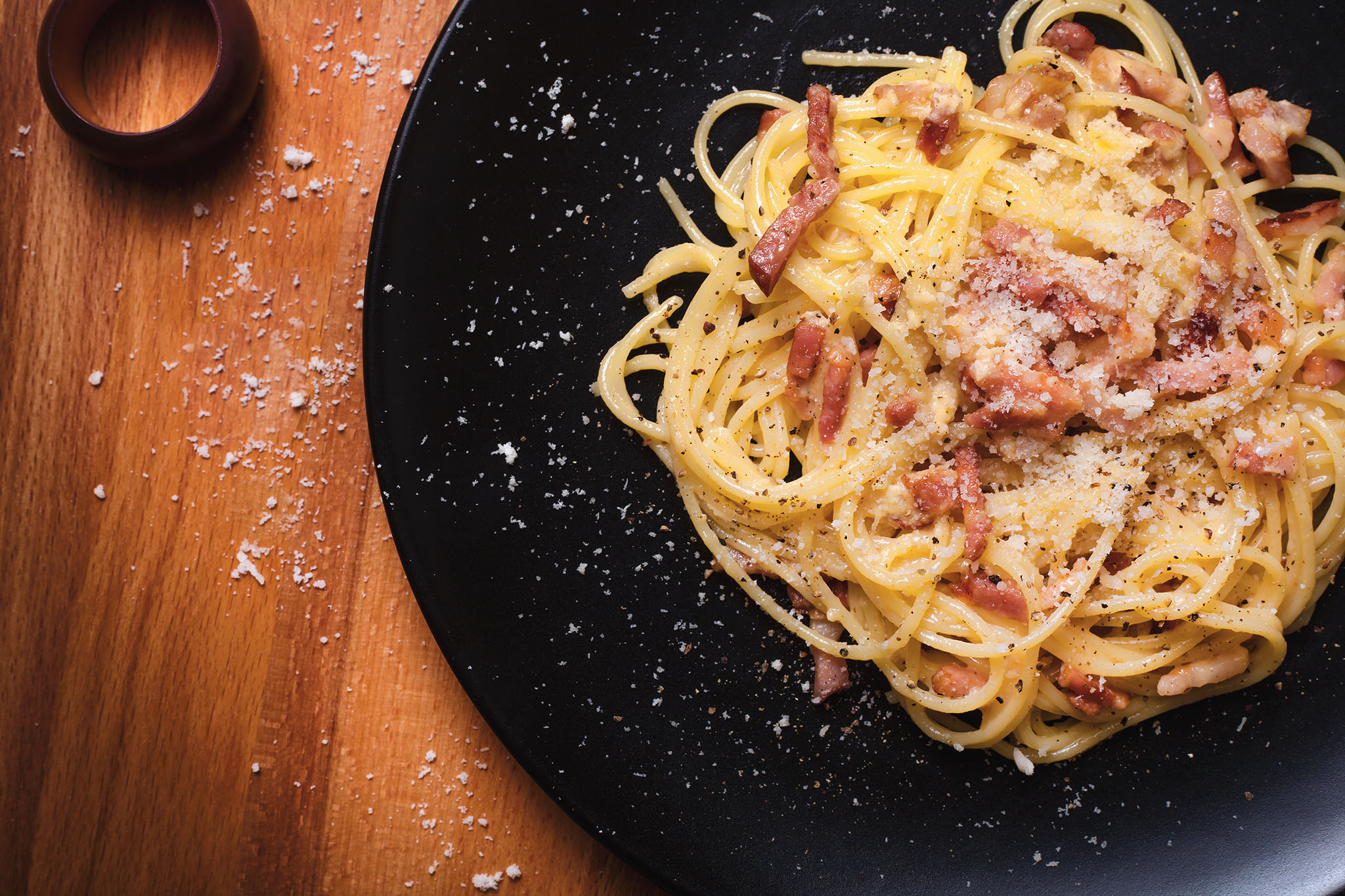 Plato de espaguetis con la salsa carbonara tradicional, hecha a base de huevo, guanciale de cerdo y queso pecorino romano.